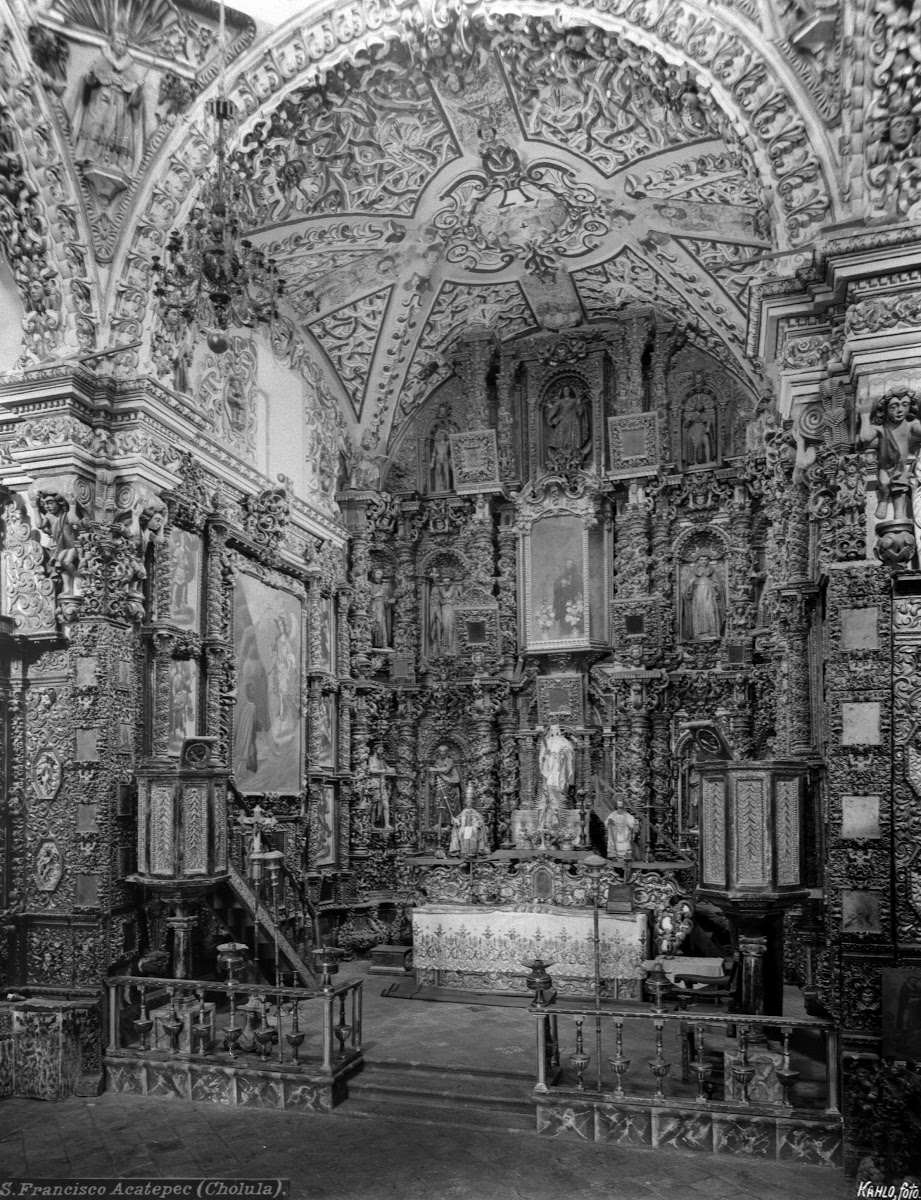 Título: Altar mayor de la iglesia de San Francisco Acatepec Creador: Guillermo Kahlo Fecha de creación: ca. 1913 Ubicación: San Francisco Acatepec, Puebla Tipo: Fotografía Técnica: Impresión contemporánea Plata/gelatina